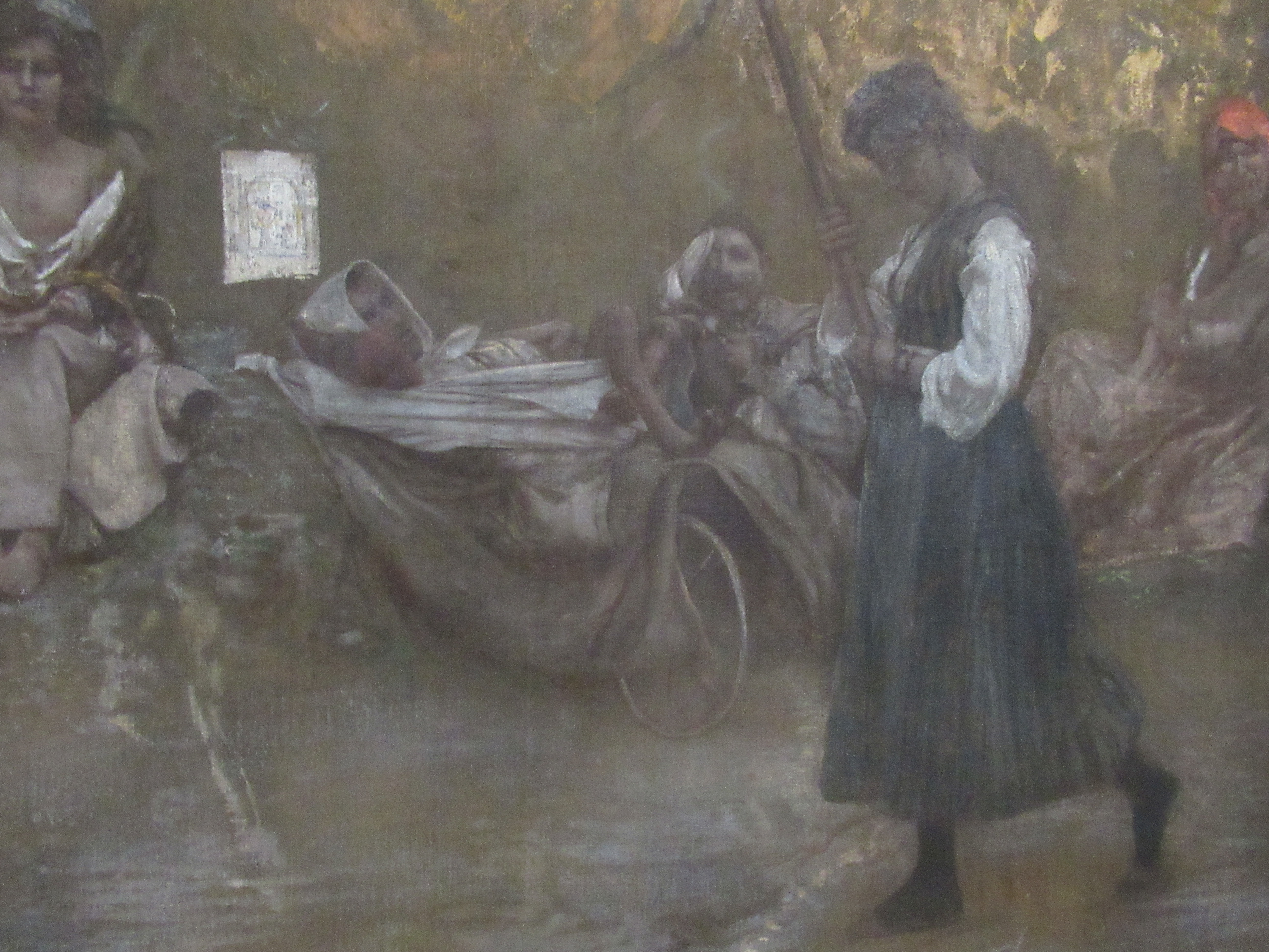 1900 giugno 2018 MUseo MIchetti Pellegrinaggio a Casalbordino (gli Storpi) di Francesco Paolo Michetti (1900)